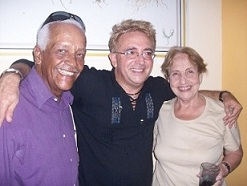 MaríaELL4